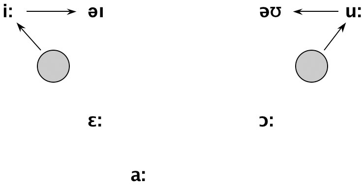 元音大推移-推变链-第一阶段示意图